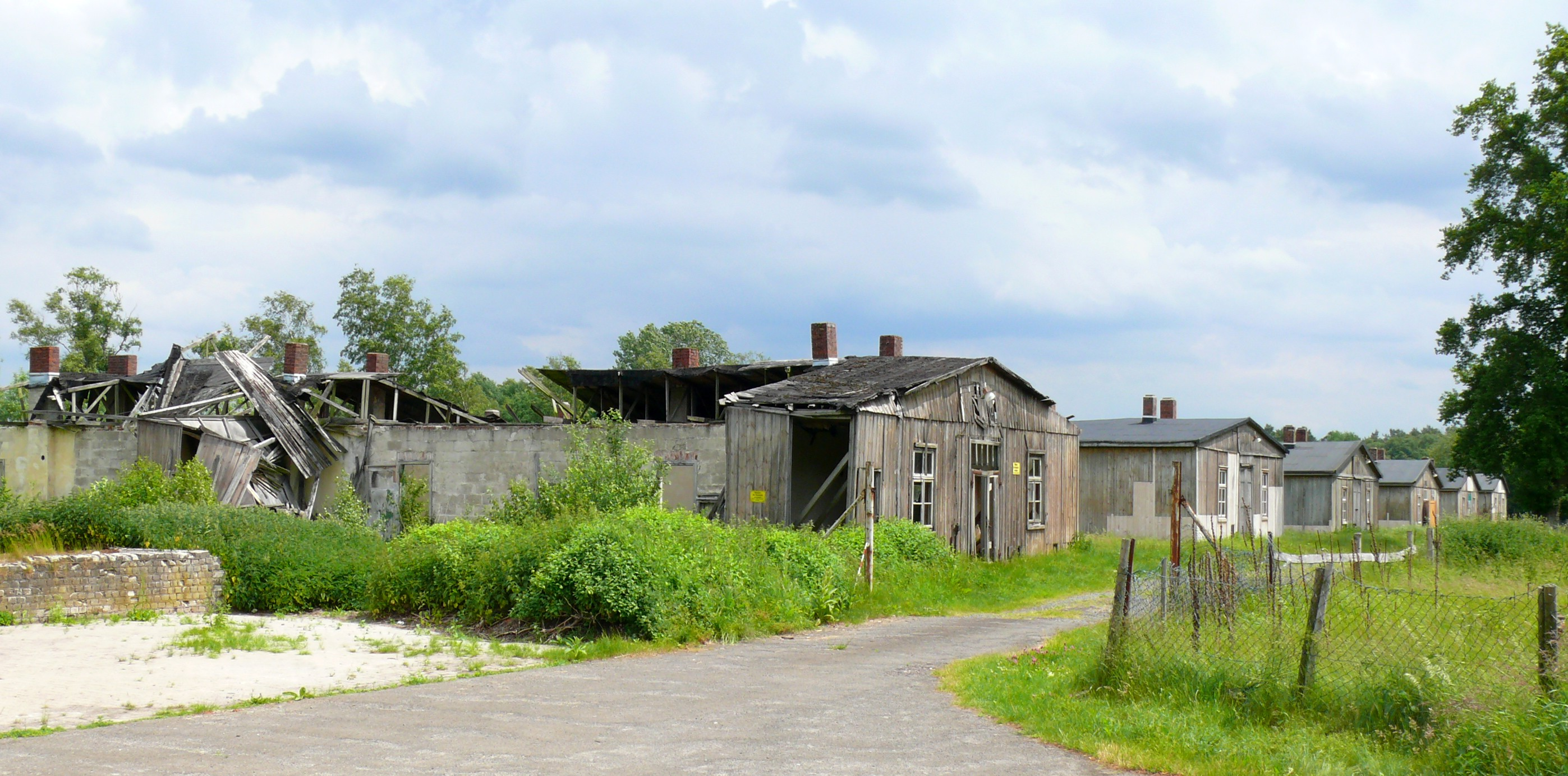 Gedenkstätte Stalag X B Sandbostel / verfallende Baracken